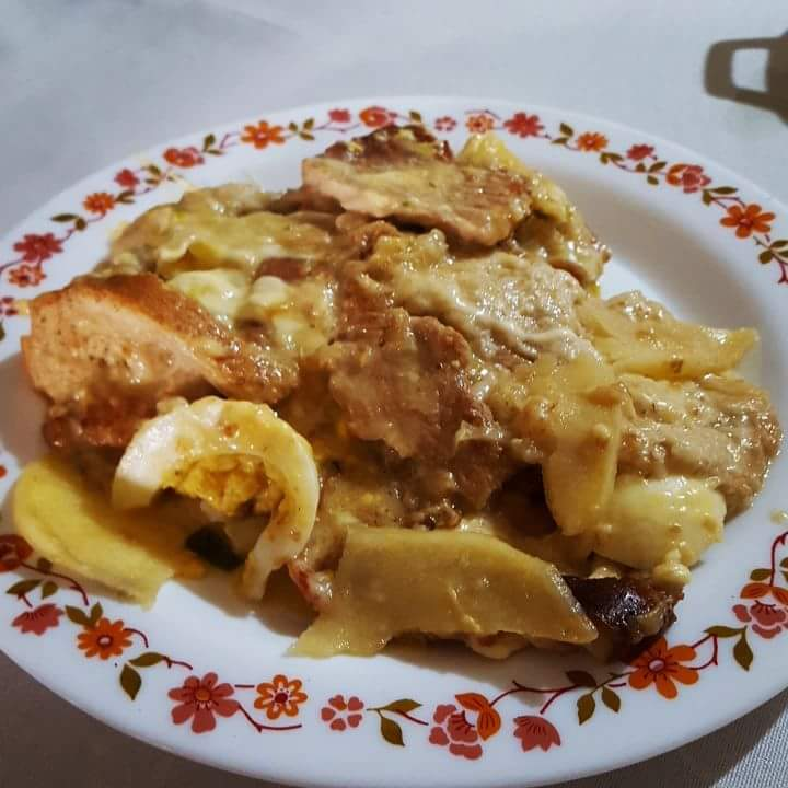 un plato de sopas de pan